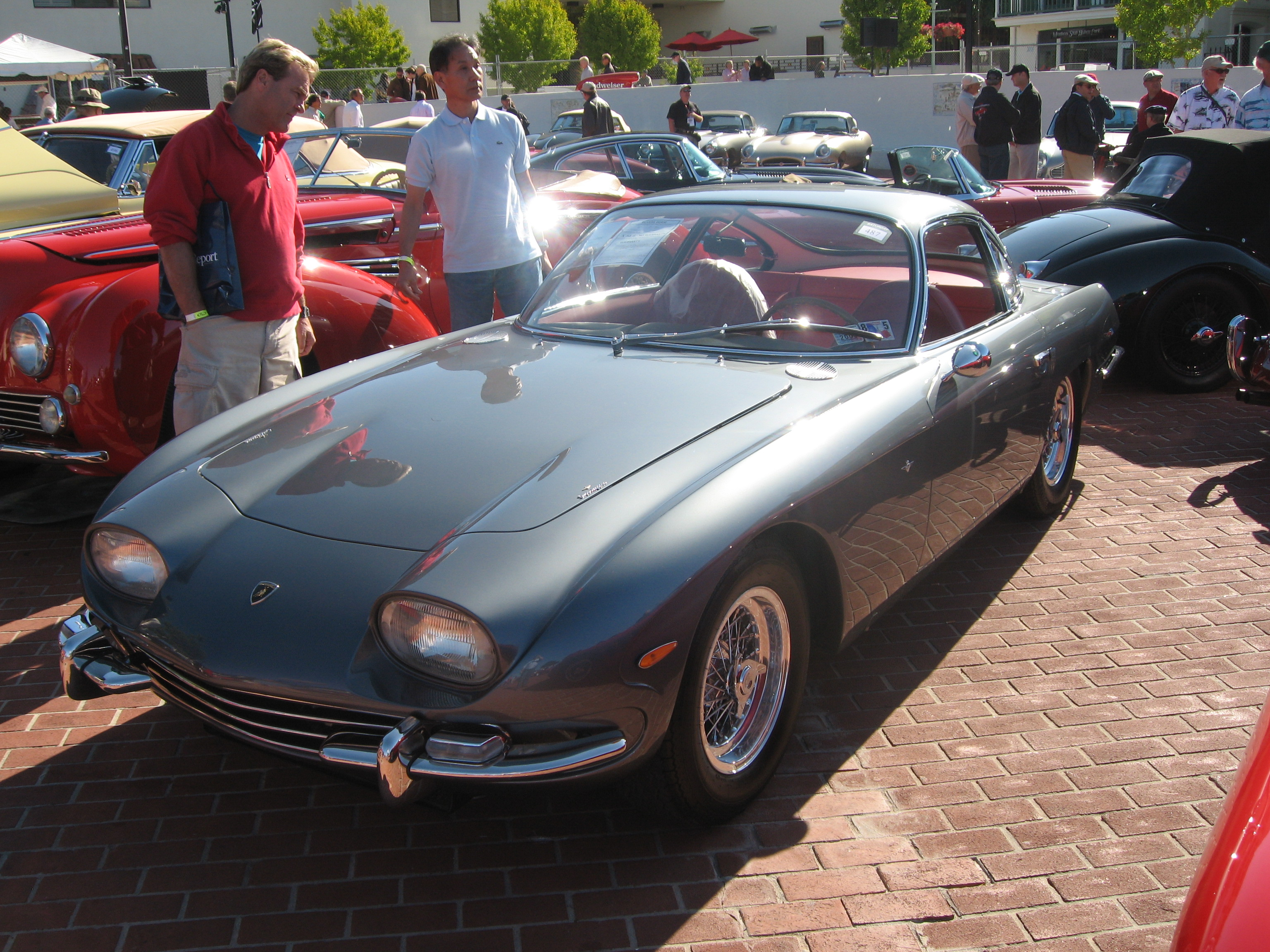 Lamborghini 350 GT 1964